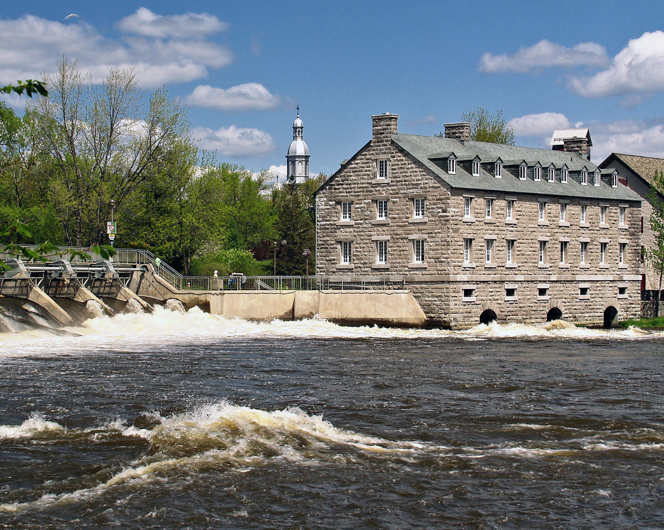 Terrebonne (Québec) - Le Moulin Neuf de l'ïle-des-Moulins